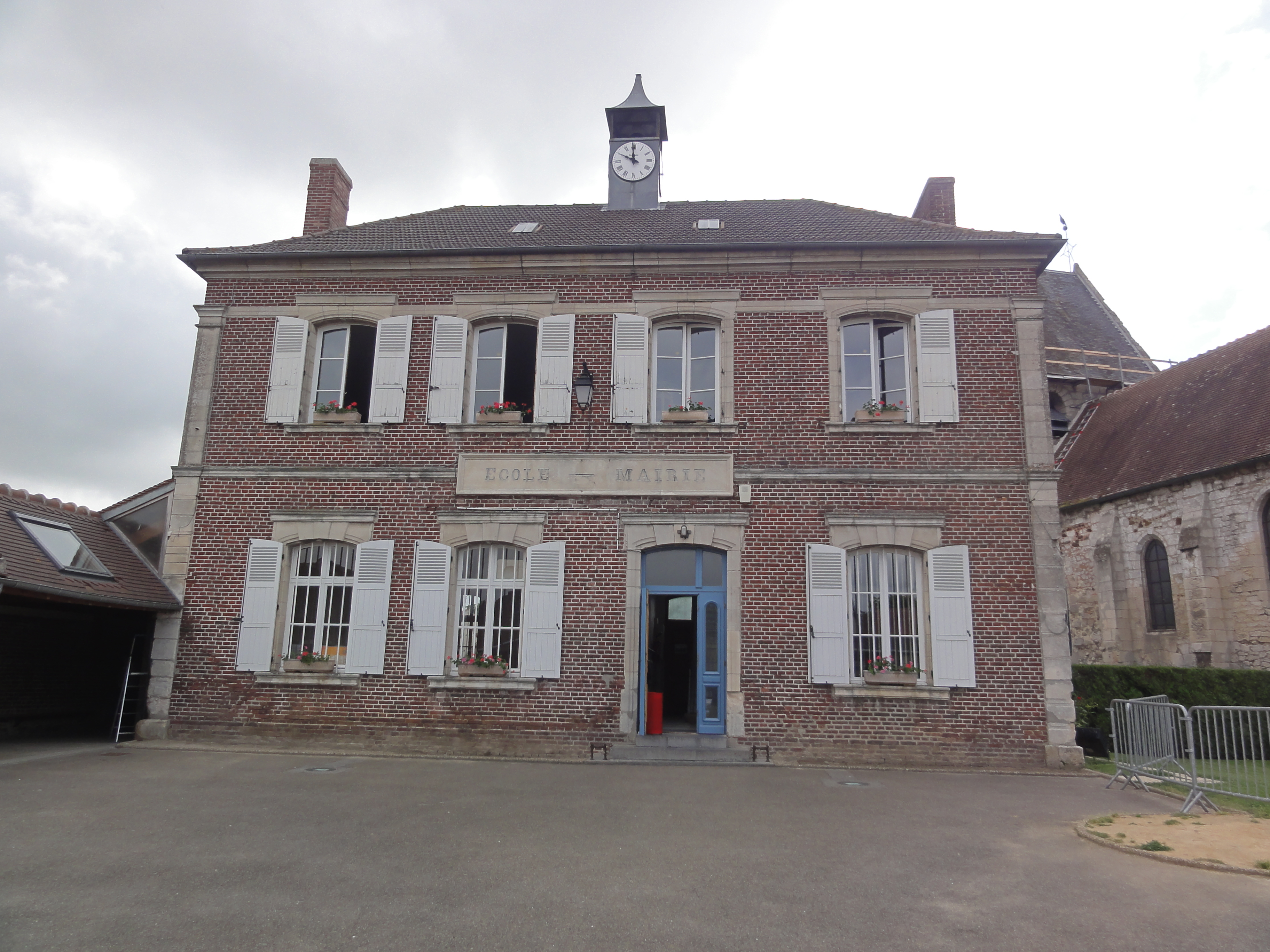 Houdancourt (Oise) Mairie-école